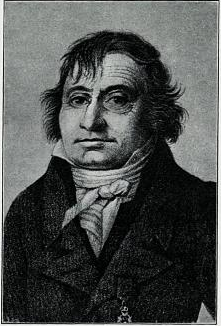 Professor Jens Ratkhe (1769–1855).